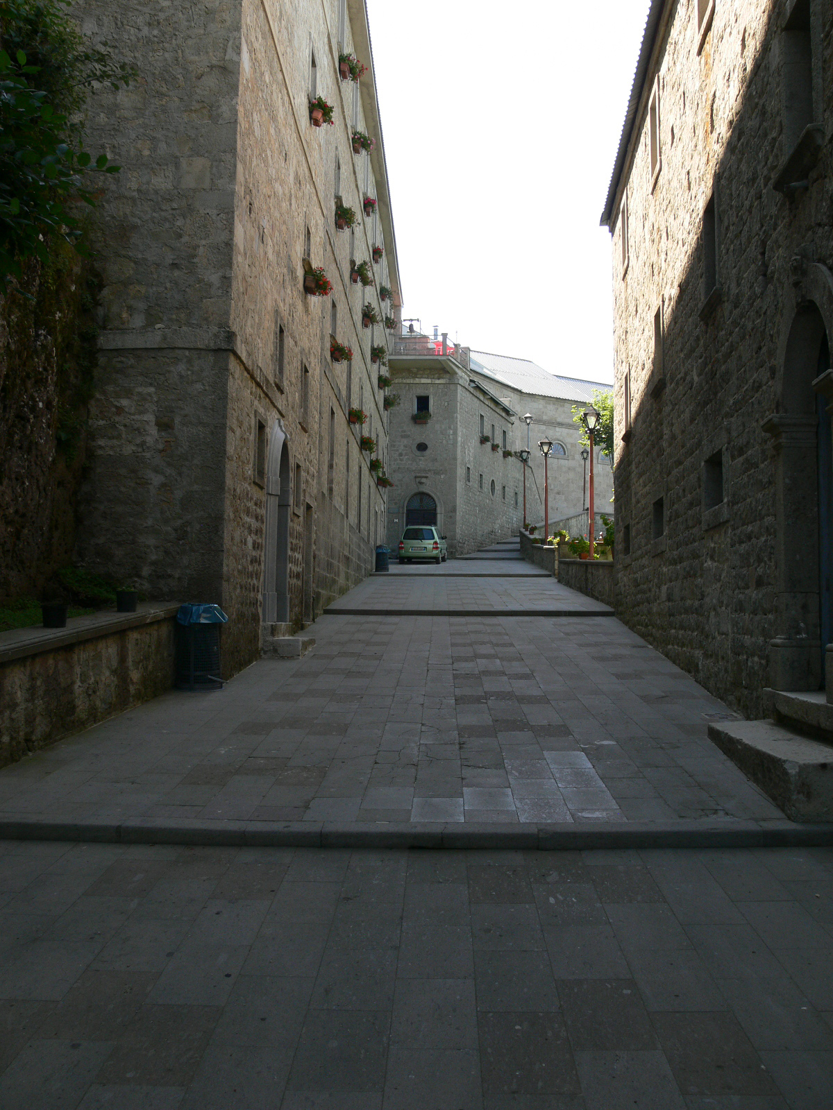 Monte Sacro (Campania)